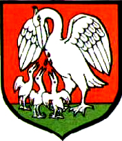 Herb Żydowa (gmina Czerniejewo)